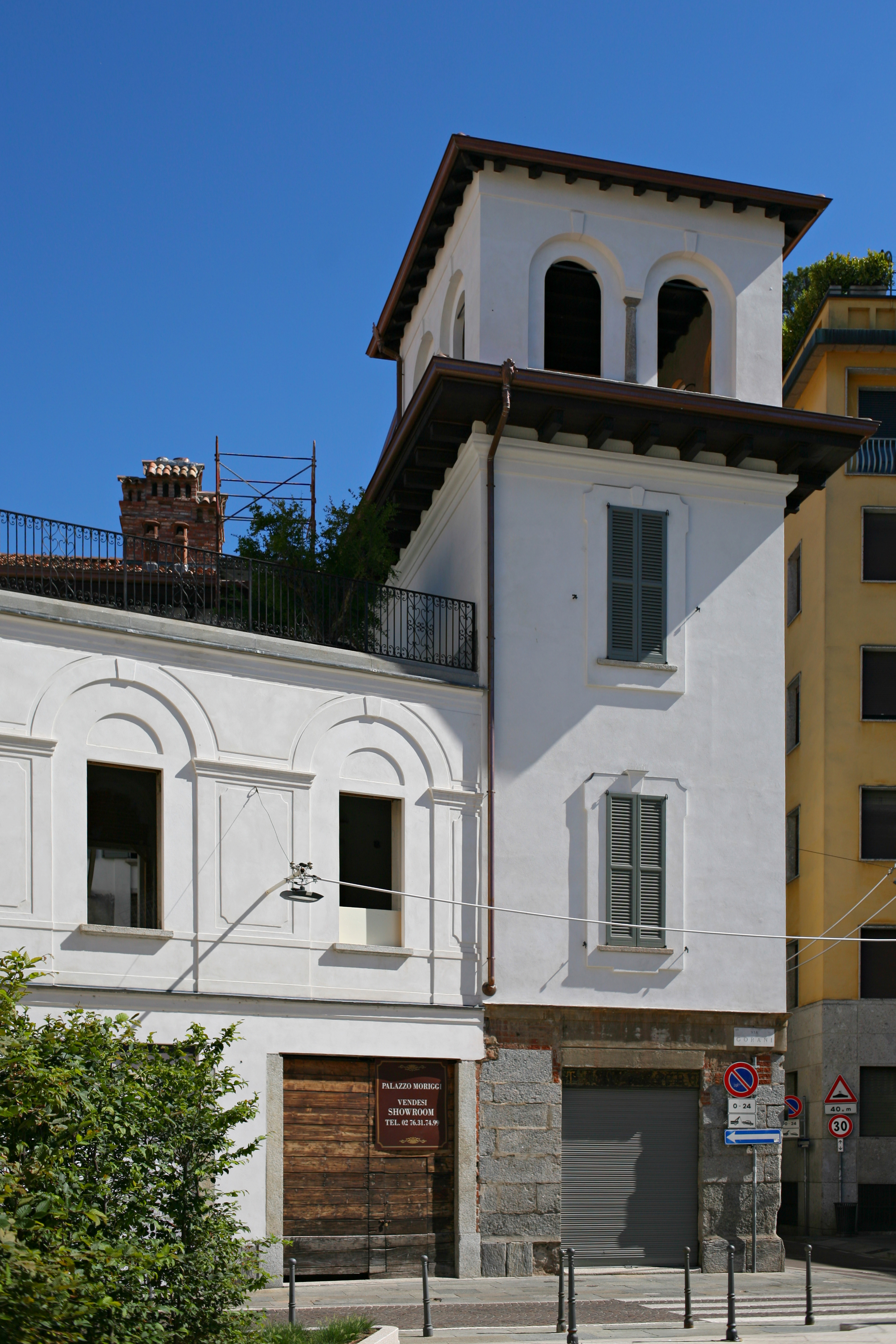 Torre dei Moriggia di Milano, dopo i restauri